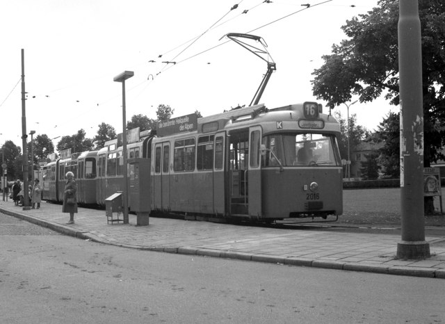 Furstenried West tram terminus, Munich